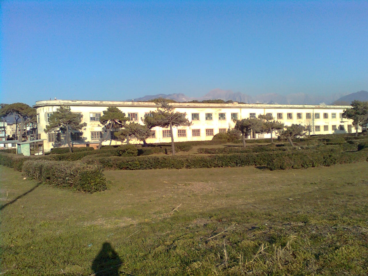 Marinella di Sarzana, Colonia IX maggio - Fronte sul mare